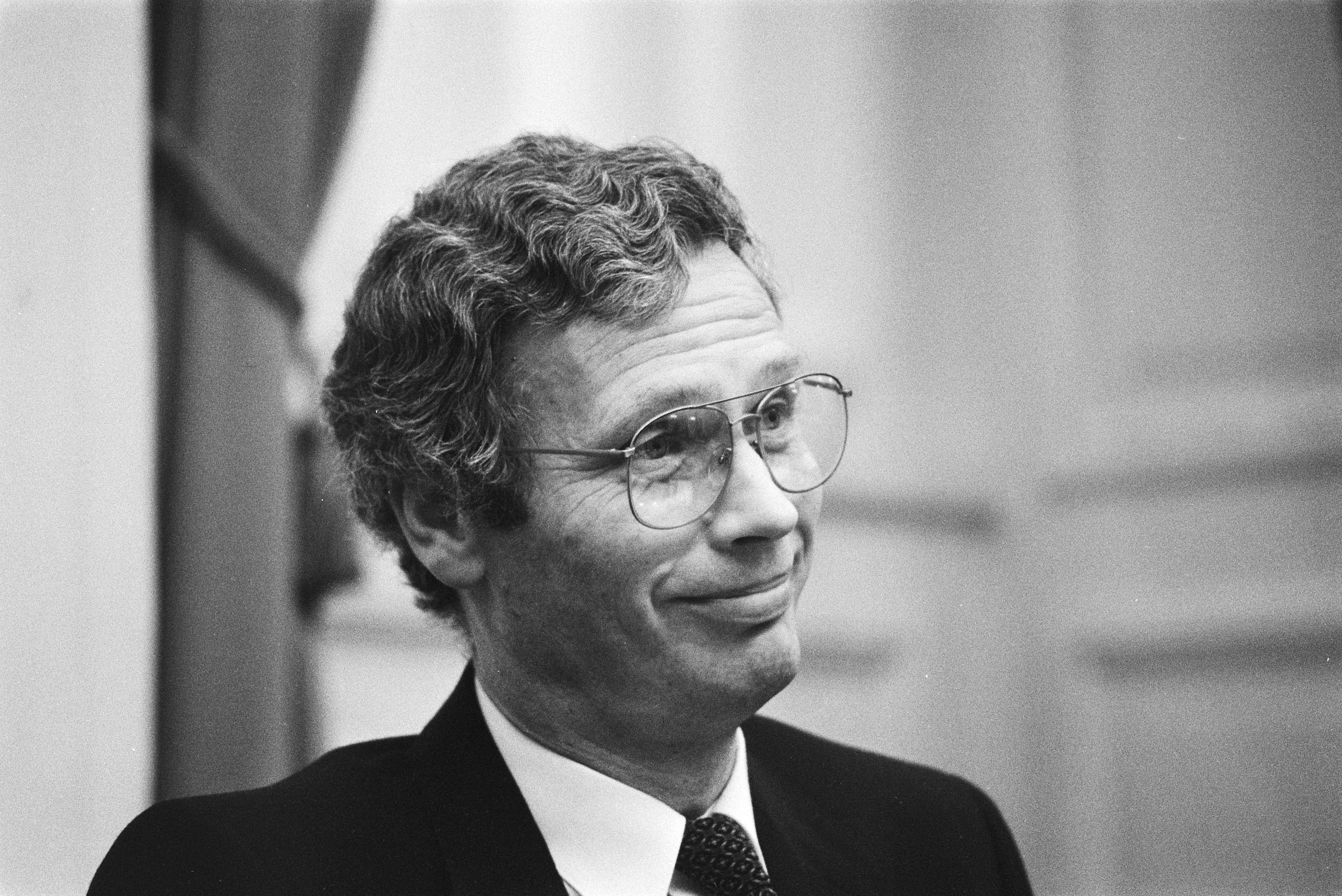 Collectie / Archief : Fotocollectie Anefo Reportage / Serie : Tweede Kamer Beschrijving : Minister Van den Broek (Buitenlandse Zaken) Datum : 8 november 1983 Locatie : Den Haag, Zuid-Holland Trefwoorden : ministers, parlementaire debatten, portretten Persoonsnaam : Broek, Hans van den Fotograaf : Rob Croes Auteursrechthebbende : Nationaal Archief Materiaalsoort : Negatief (zwart/wit) Nummer archiefinventaris : bekijk toegang 2.24.01.05 Bestanddeelnummer : 932-7643